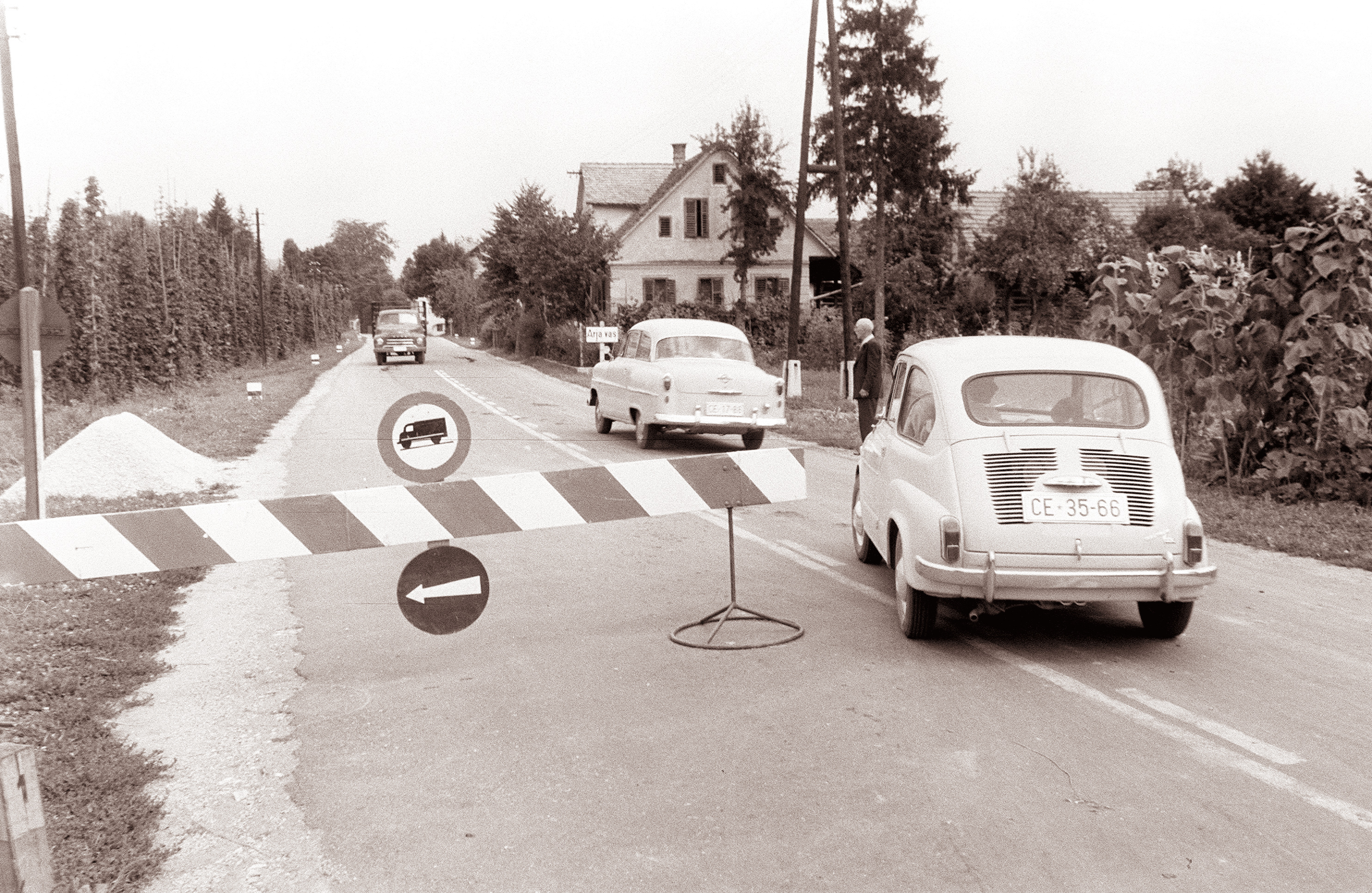 Obvoz za tovornjake v Arji vasi